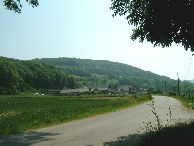 Ammeldingen an der Our, (Eifel), Blick auf den Ort aus Richtung Gentingen